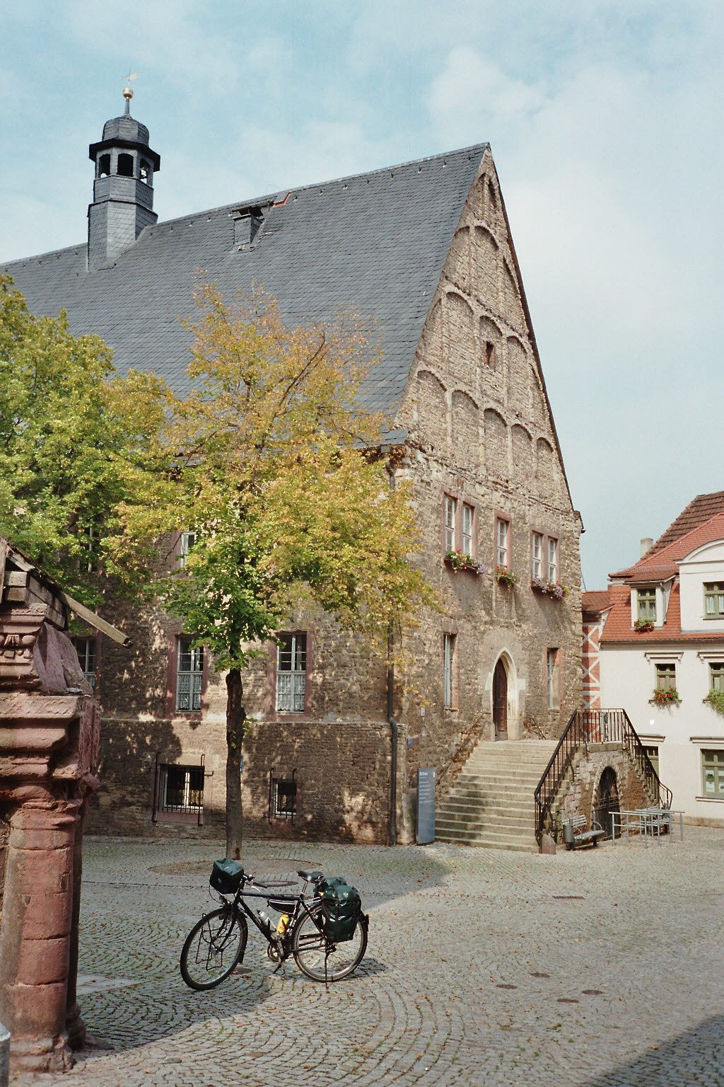 Das Rathaus von Sangerhausen, Deutschland